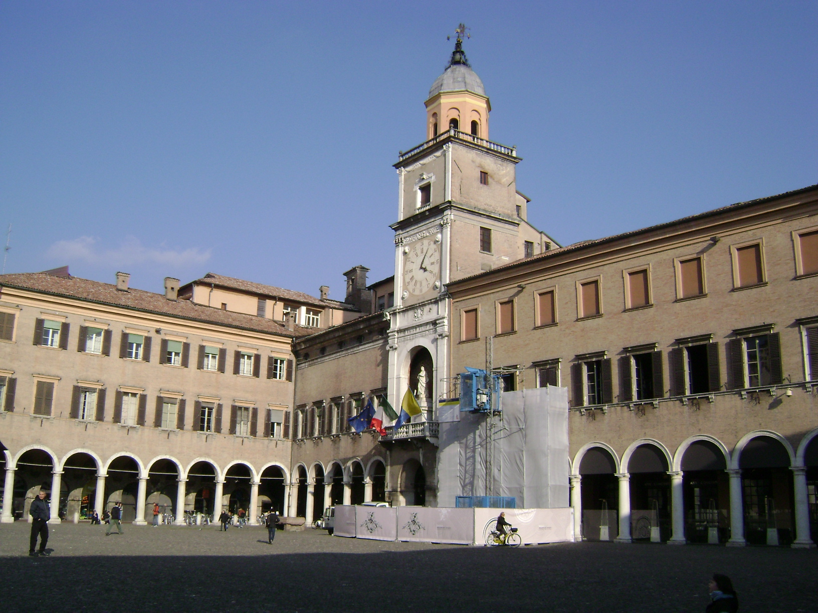 Palazzo Comunale di Modena